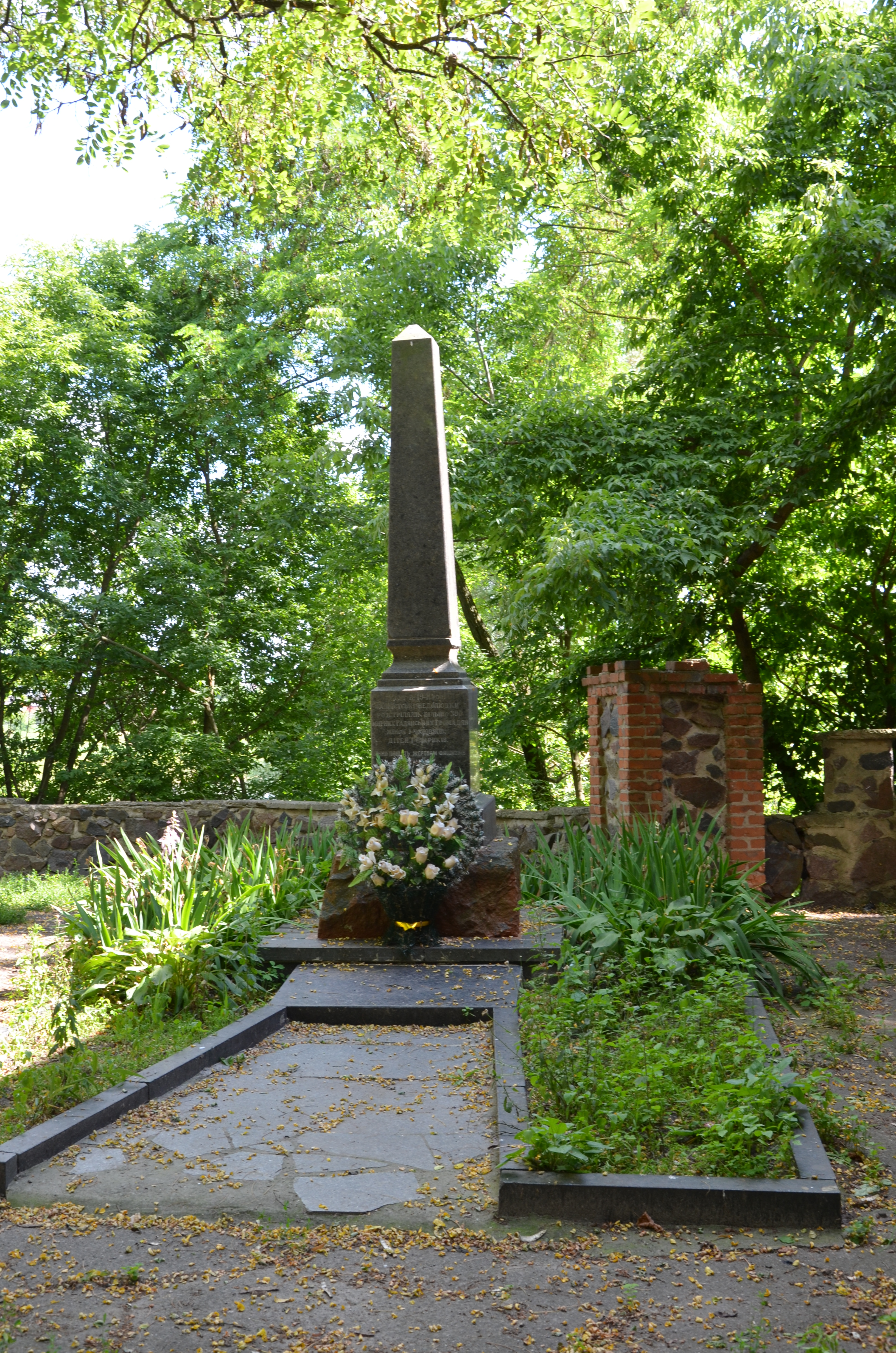 Пам’ятник на місці розстрілу фашистами більше 300 мирних жителів у червні 1941 р., Макарів, у парку